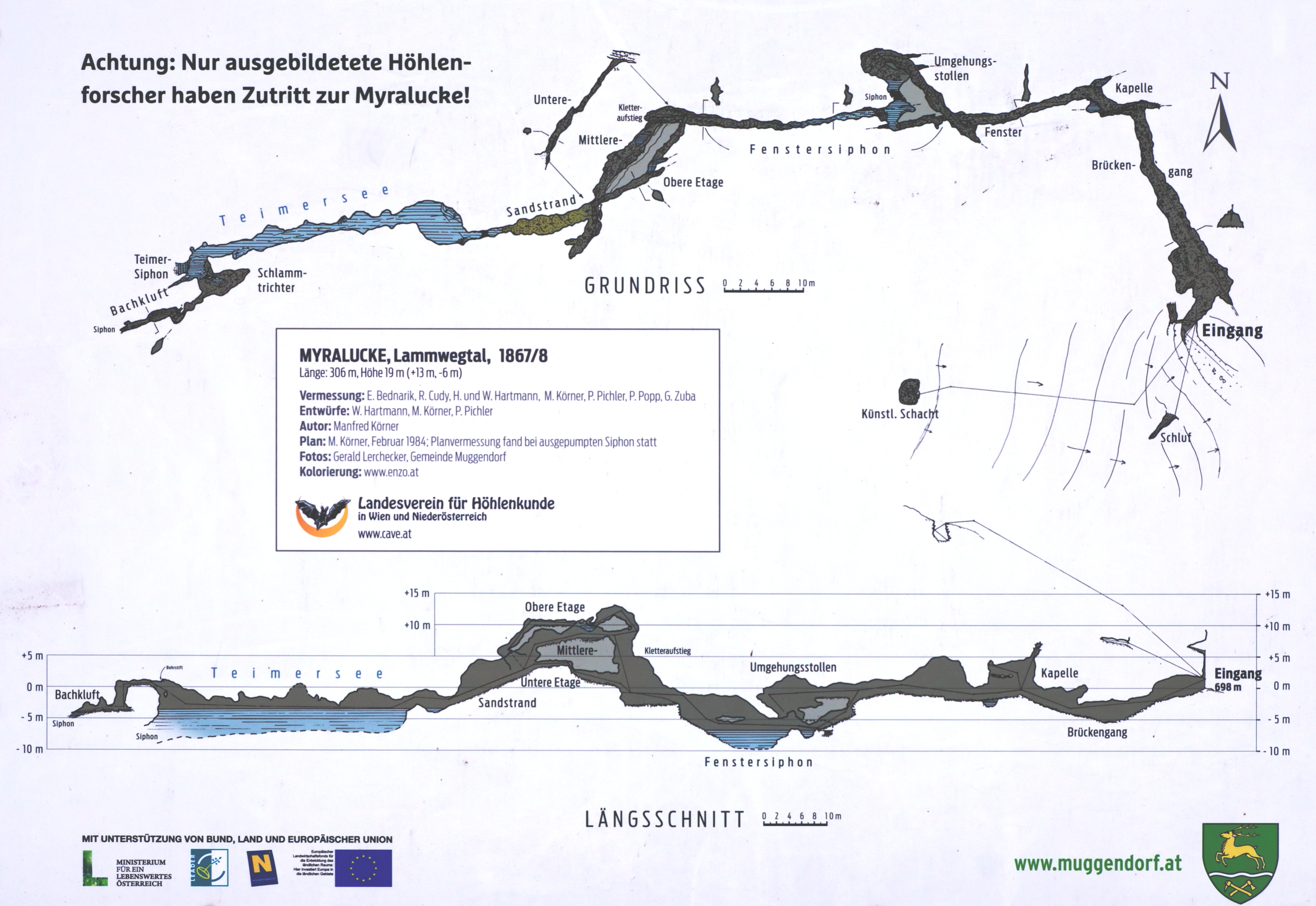 Infotafel über die Myralucke in der niederösterreichischen Gemeinde Muggendorf. Die Tafel ist öffentlich zugänglich und befindet sich unmittelbar vor der Myralucke im Lamwegtal.